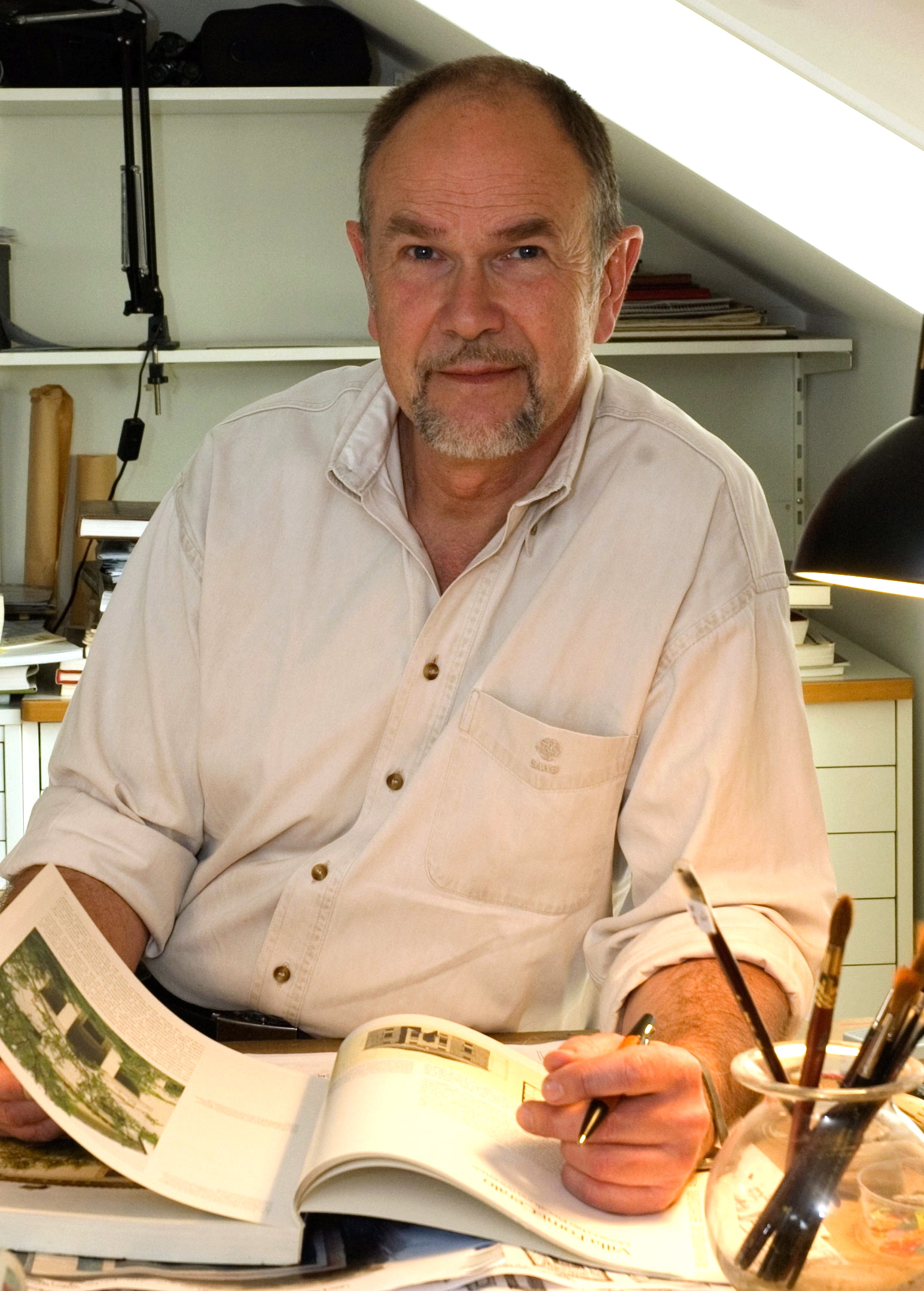 Scenografen Lars-Åke Thessman.